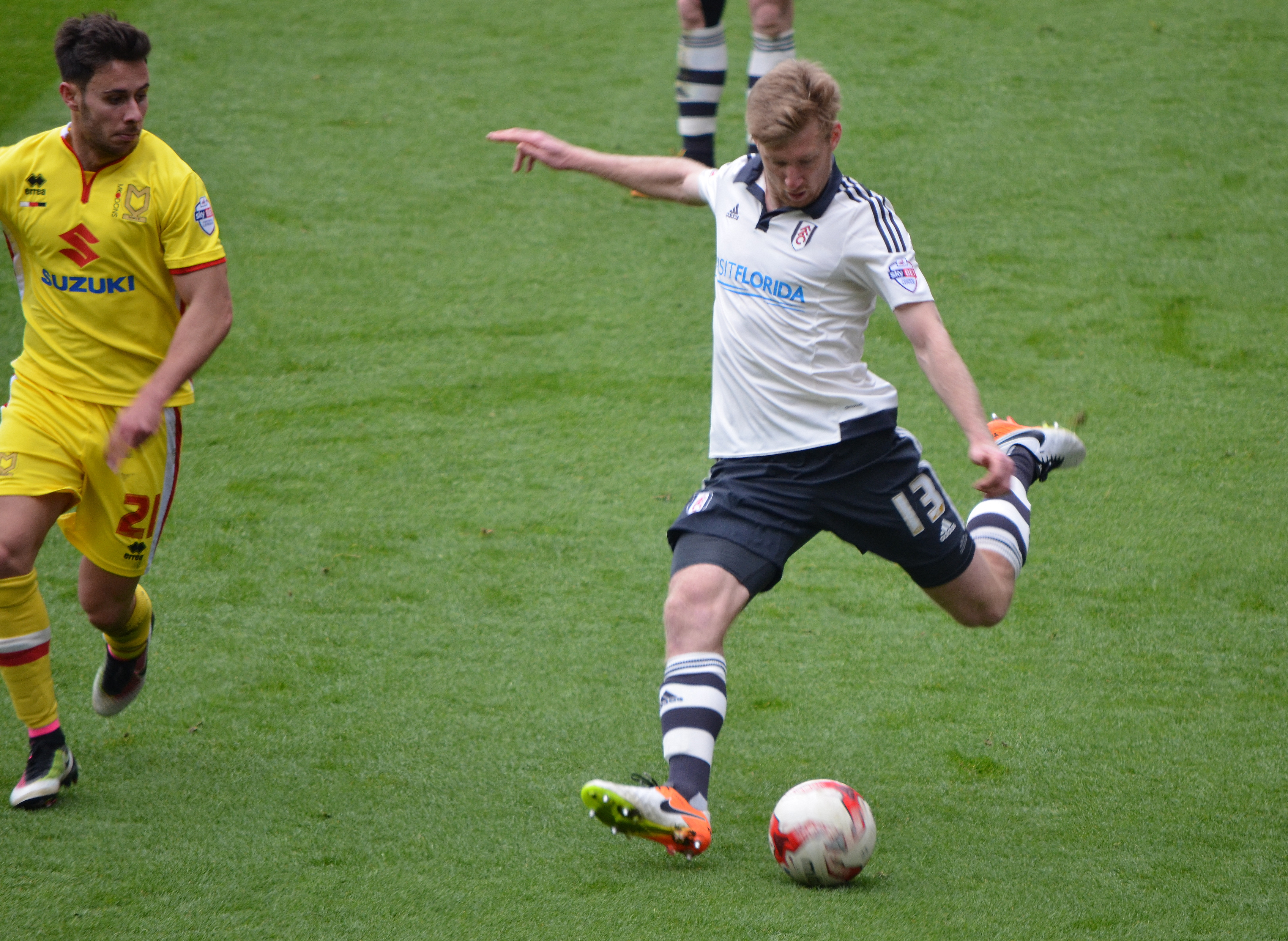 Tim Ream, Fulham FC